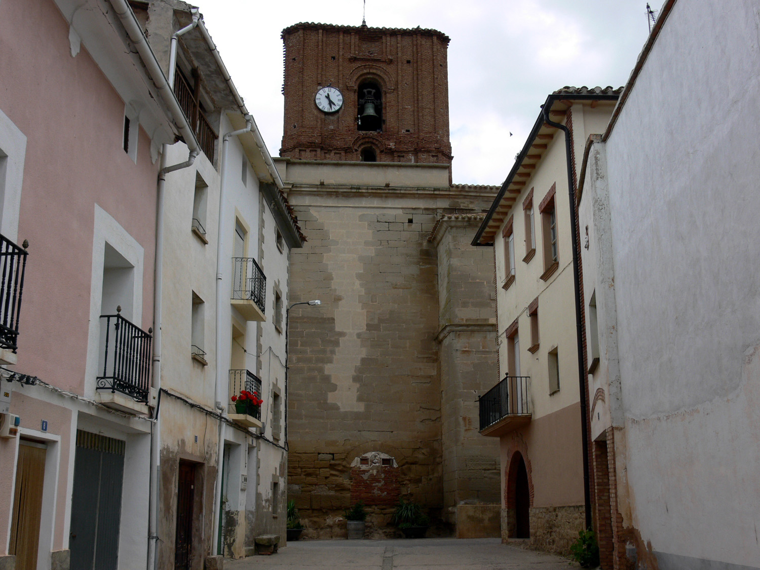 Iglesia de San Sebastián en Corera (La Rioja - España).